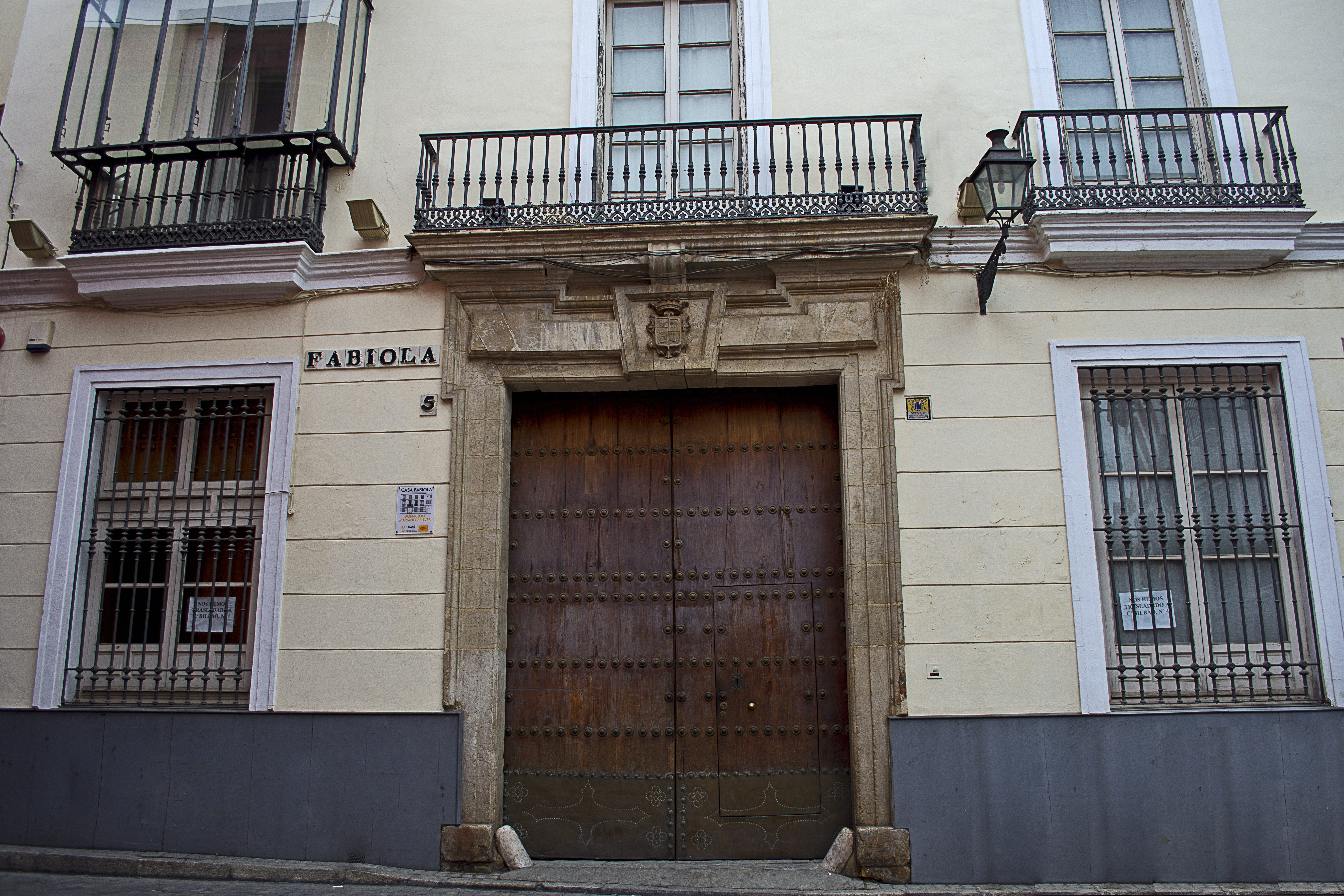 Cafa Fabiola. Sede del museo Bellver en Sevilla. (Está prevista la inauguración en junio de 2018)